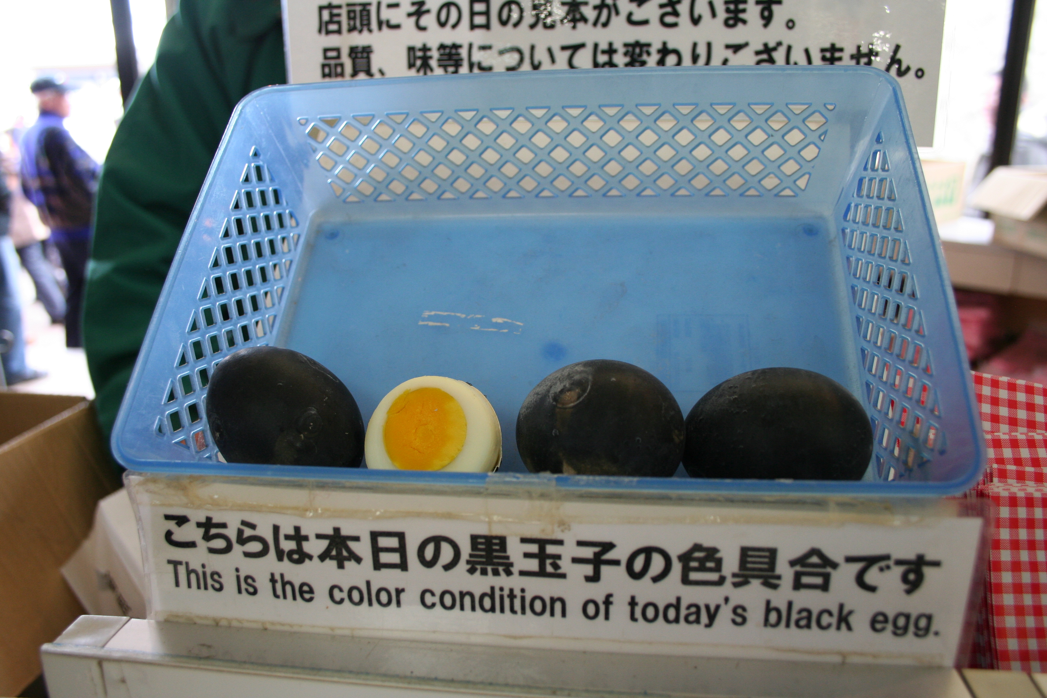 本日の黒玉子